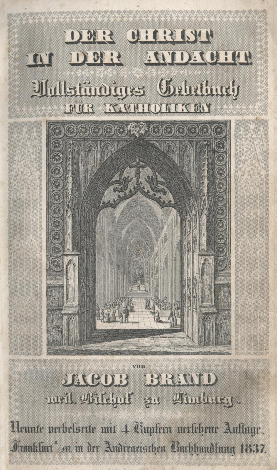 Jakob Brand, Bischof von Limburg, Buchtitelblatt, 1837